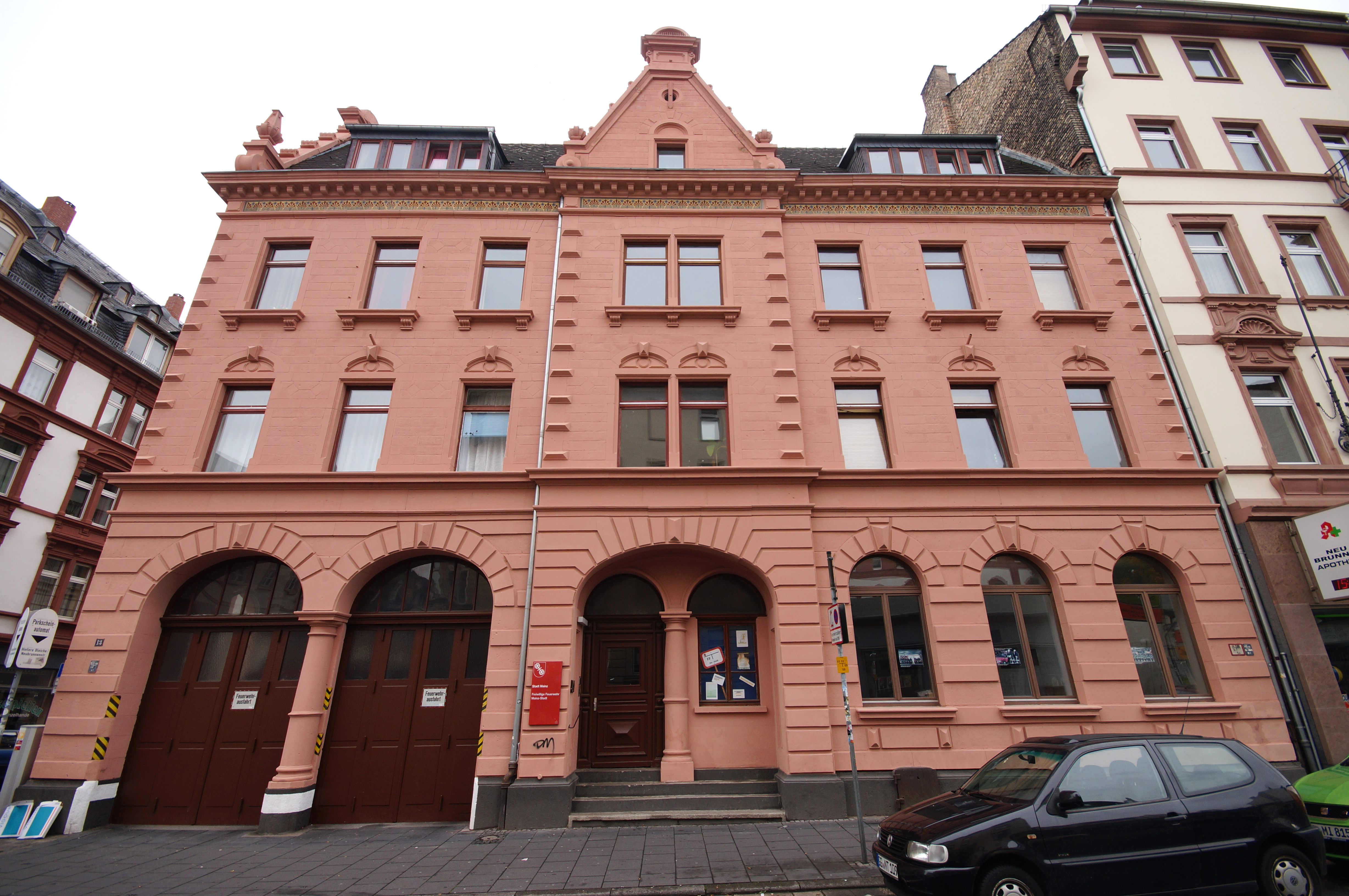 Der erste Sitz der Feuerwehr Mainz und der ehemalige Sitz der Freiwilligen Feuerwehr Mainz-Stadt in der Neubrunnenstraße 13 in Mainz-Altstadt.